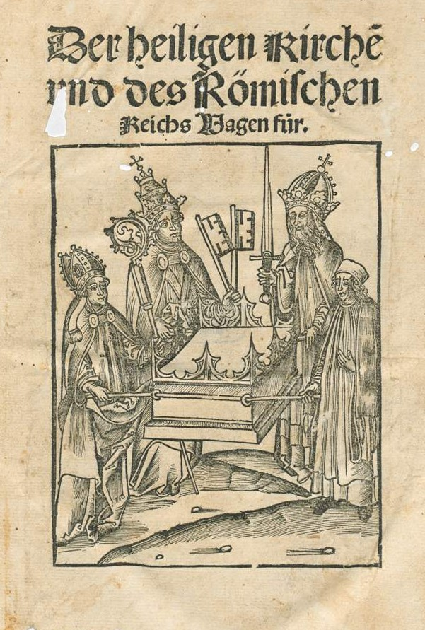 Hug, Johannes: Der heiligen Kirche[n] und des Römischen Reichs Wagen fur, Straßburg 1504 [VD16 H 5806]